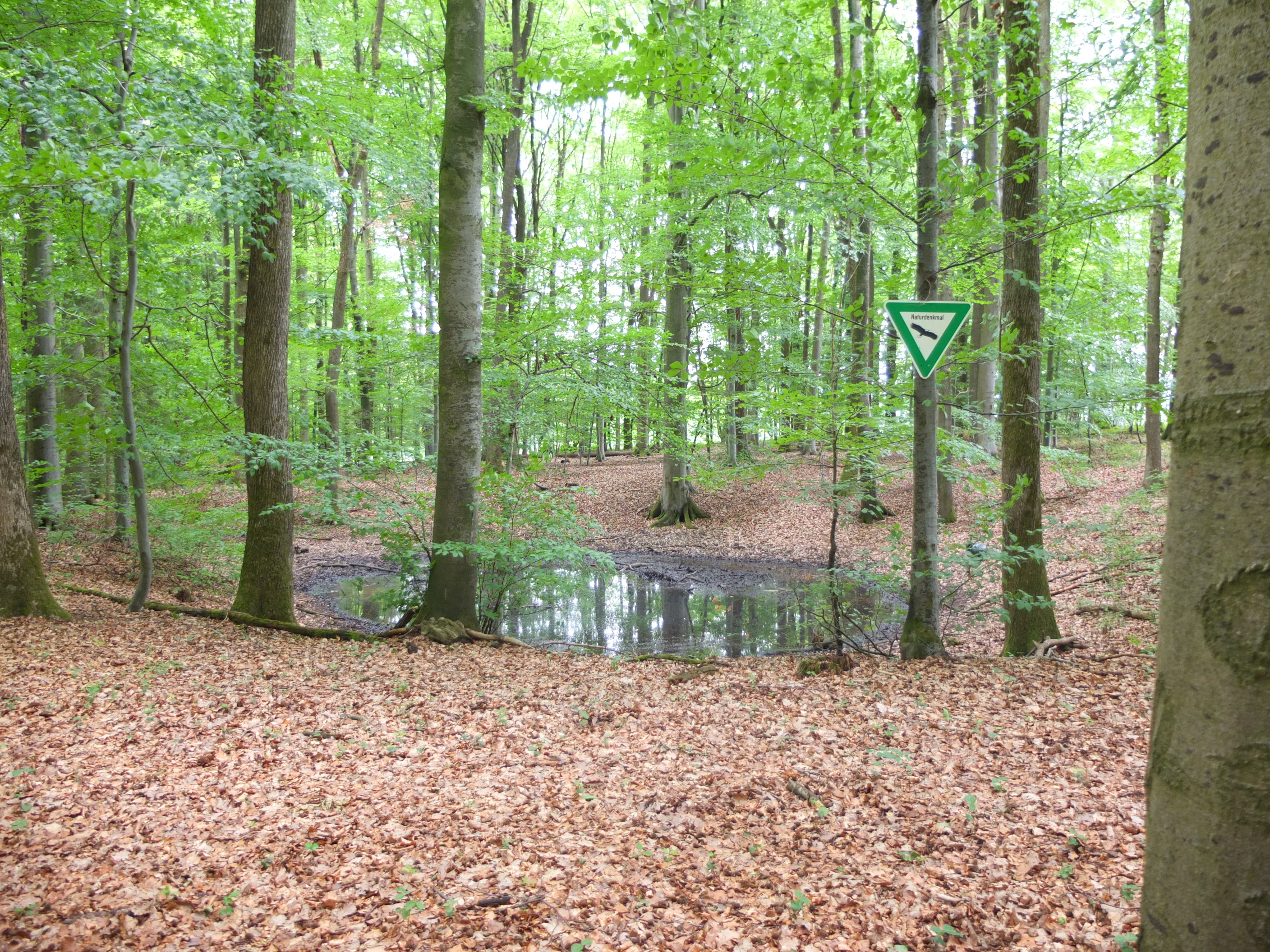 Wassergefüllte Doline im Waldgebiet nordöstlich von Künzelsau-Garnberg.